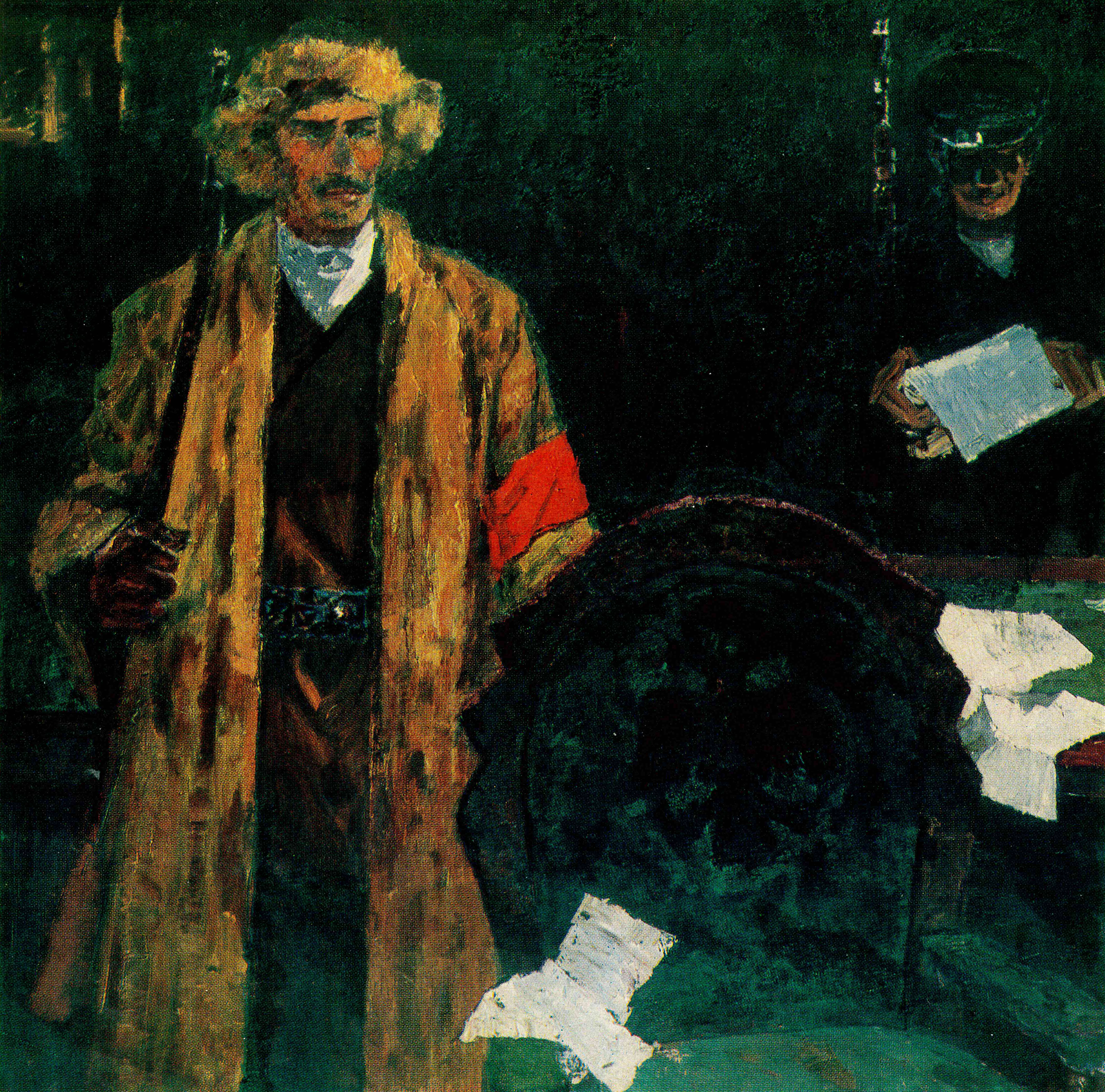 Именем Революции. Холст, масло, 145*145 см, Молдабеков А., 1967 год